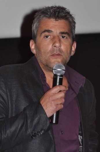 Alain Guiraudie à l'avant-première du film "Le roi de l'évasion"